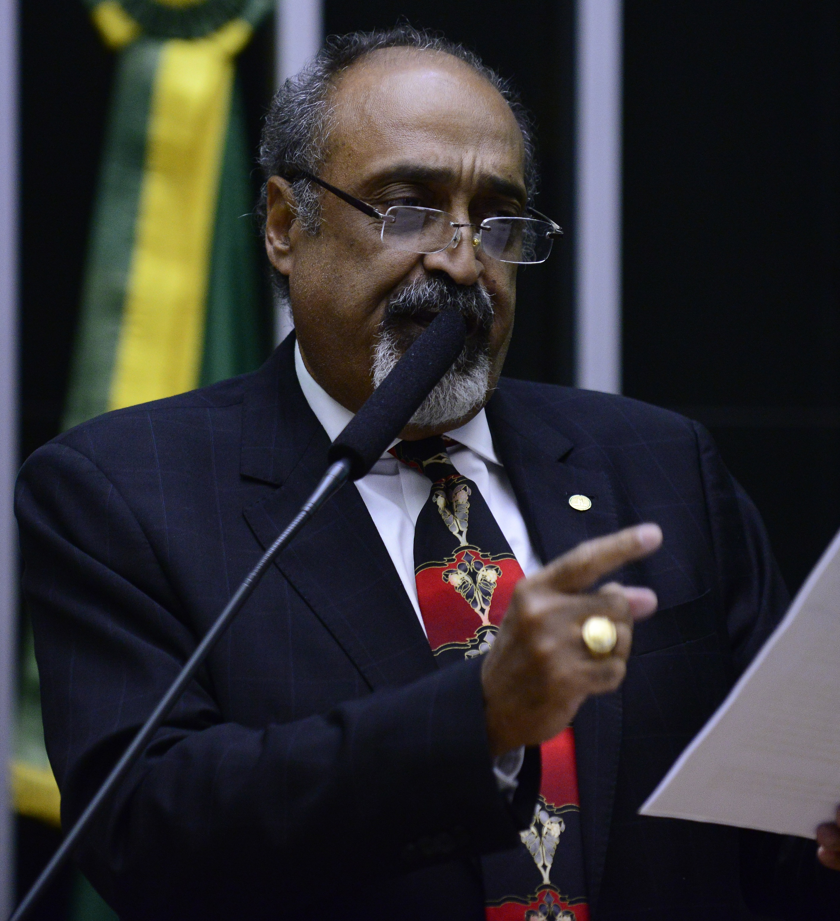 Ezequiel Teixeira em abril de 2016.